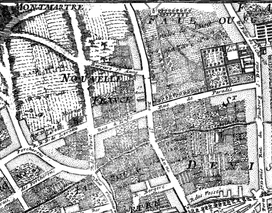 Paris : La Nouvelle France à Paris en 1705. Pour toutes informations voir Image:Plan de Paris 1705 BNF07710700.png d'ou cette image est extraite.